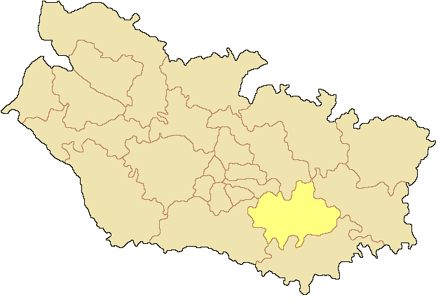 Canton de Moreuil dans le département de la Somme